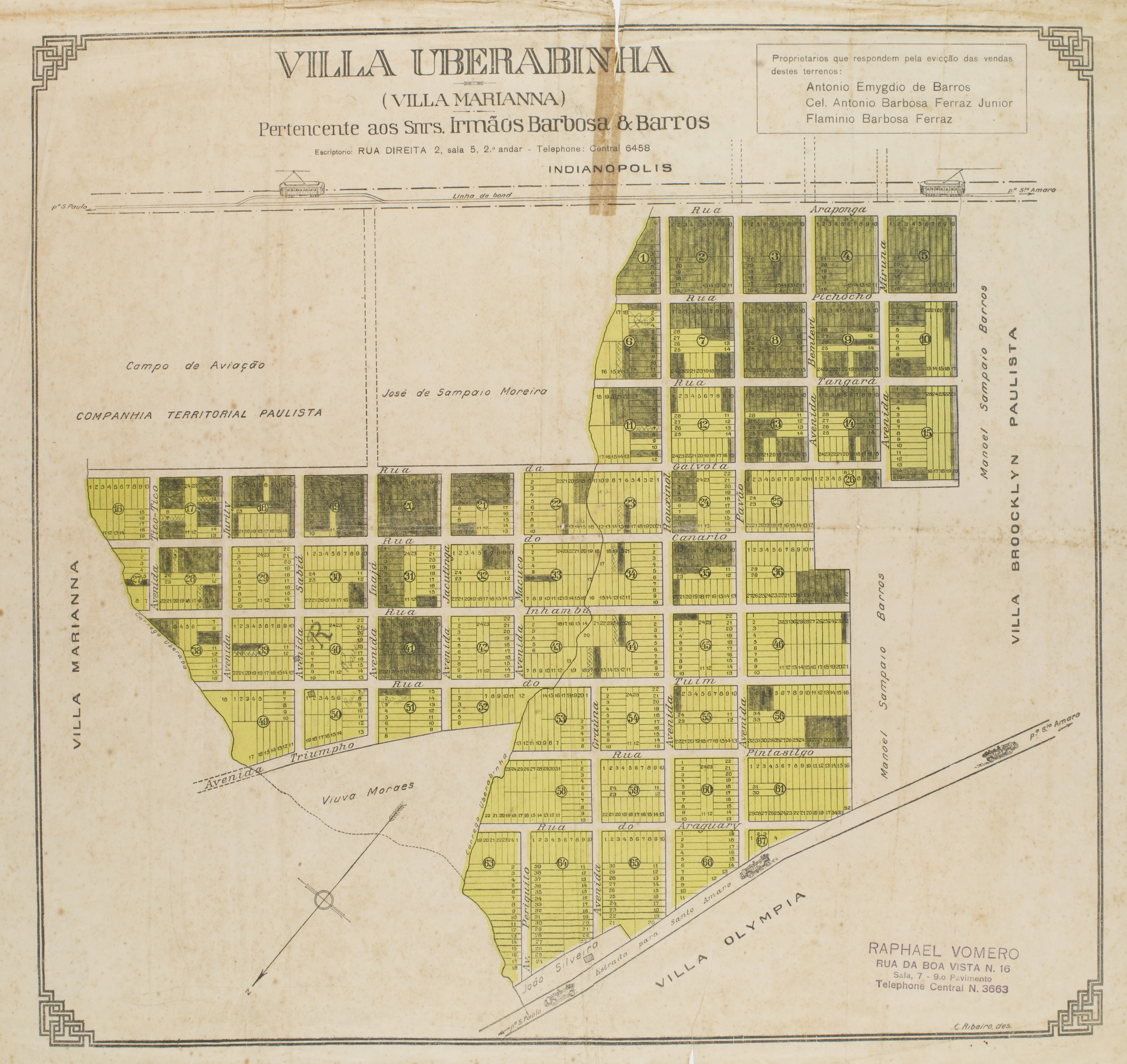 Obra que integra o acervo do Museu Paulista da USP. Coleção João Baptista de Campos Aguirra